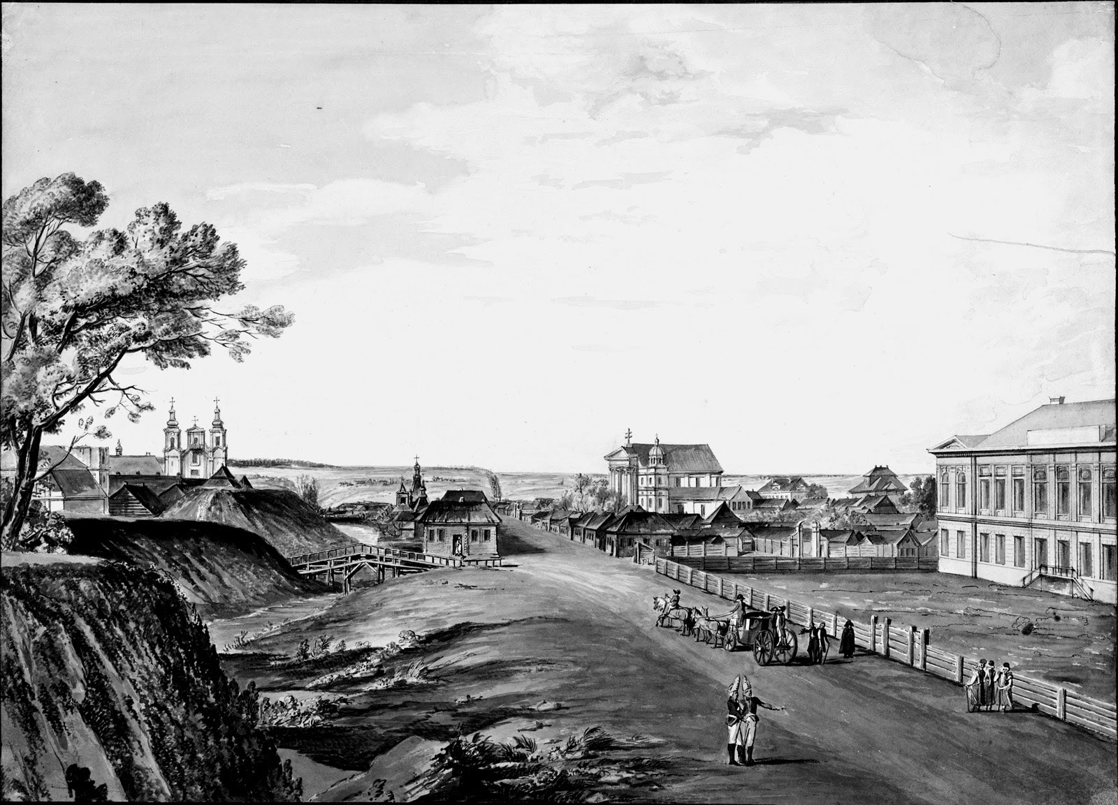 Беларуская (тарашкевіца): Магілёў (Mahiloŭ). вуліца Шляхецкая (vulica Šlachieckaja)